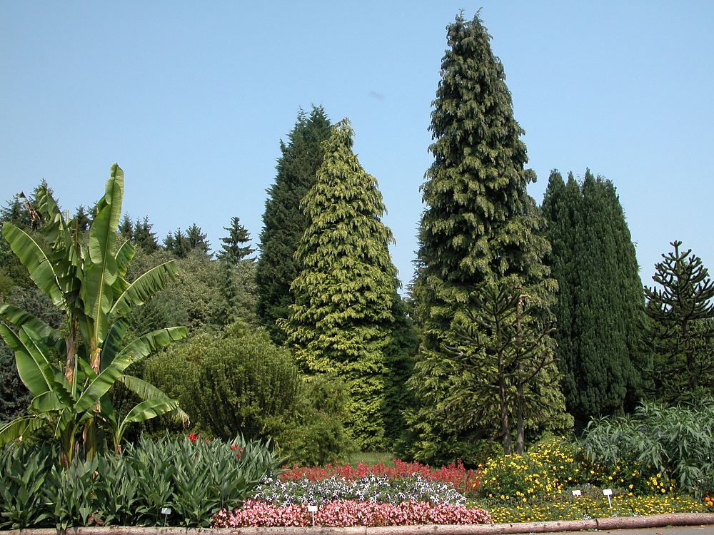 Marburg, Neuer Botanischer Garten, Germany